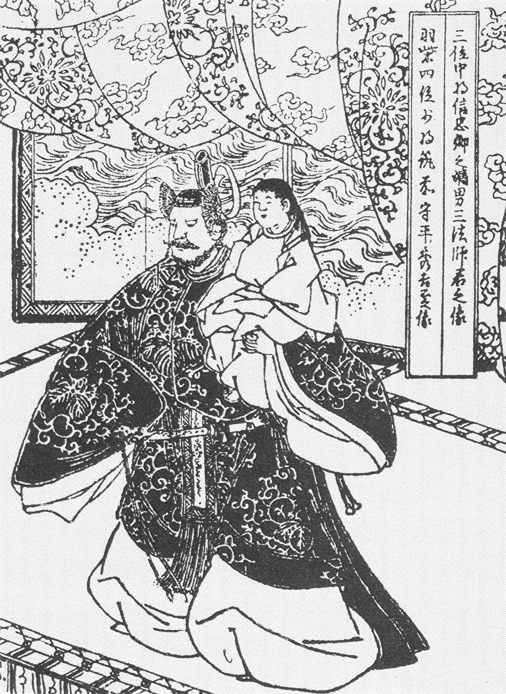 絵本太閤記 ［説明］ 日本城郭資料館所蔵 清洲会議の一場面。豊臣秀吉が3歳の三法師を抱いてあらわれた。